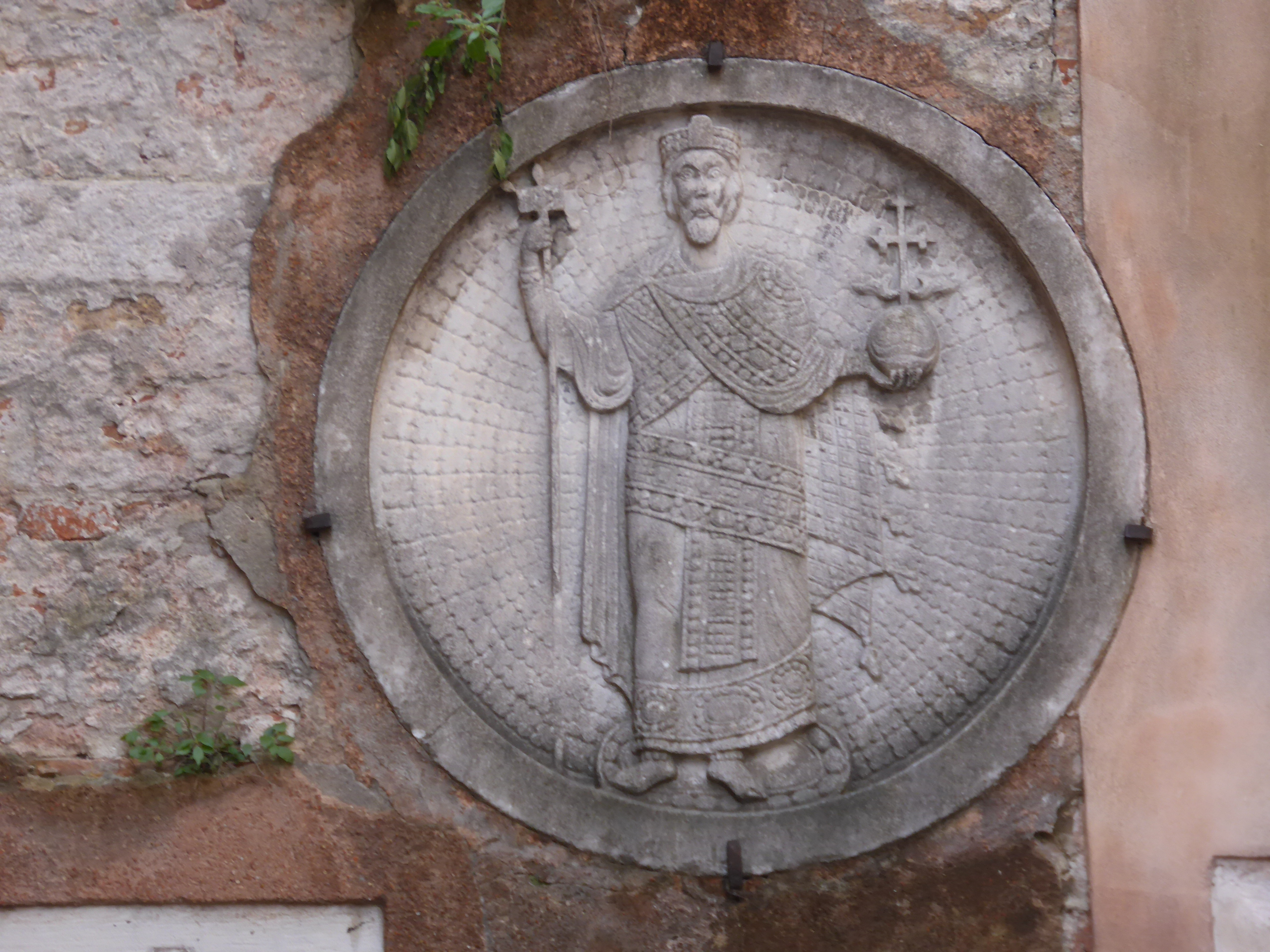 Byzantinischer Kaiser, Spolie